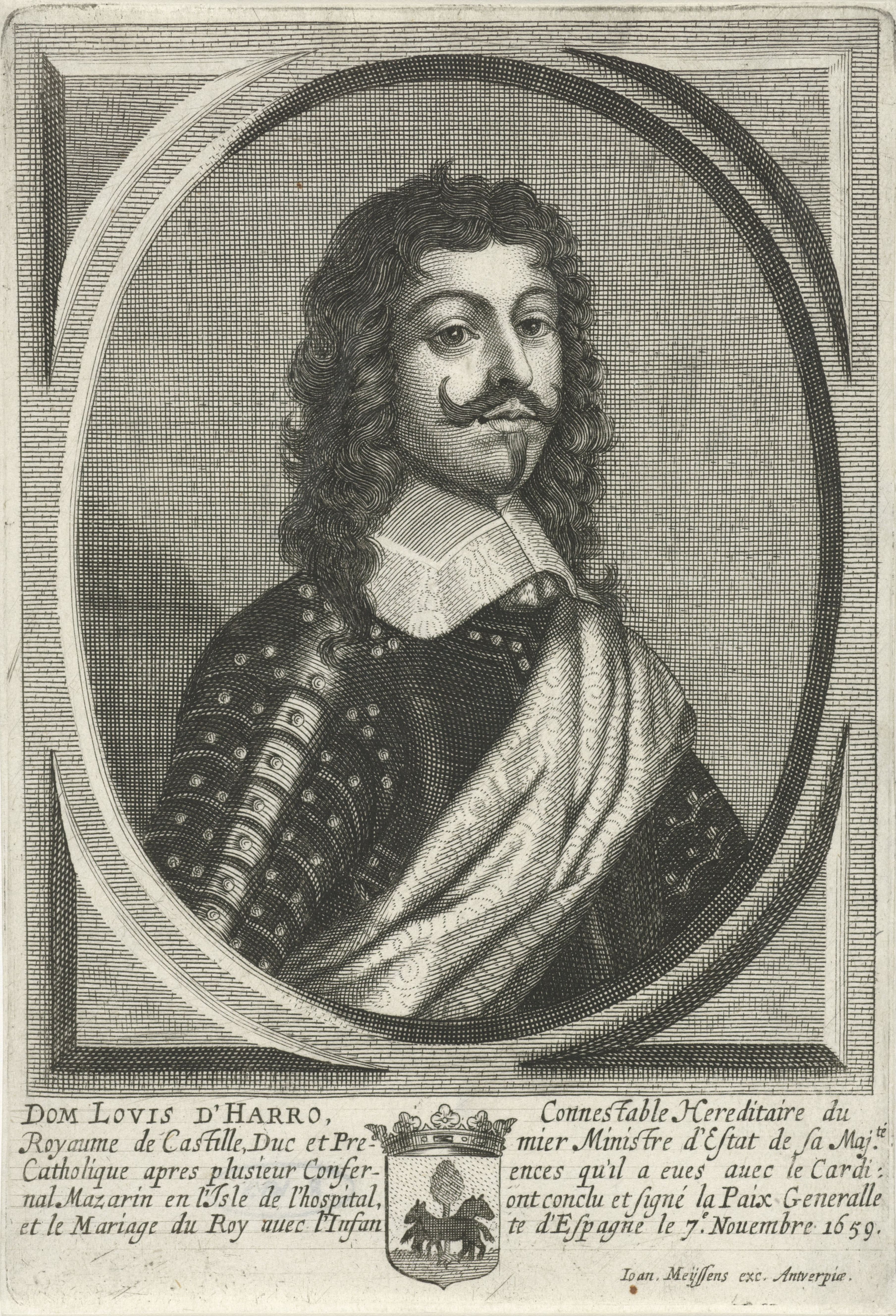 IdentificatieTitel(s): Portret van Lius Méndez de HaroObjecttype: prent Objectnummer: RP-P-OB-23.594Opschriften / Merken: verzamelaarsmerk, verso, gestempeld: Lugt 2228Omschrijving: Portret van Lius Méndez de Haro. Onderaan in de marge zijn wapenschild en een vijfregelige tekst in het Frans.VervaardigingVervaardiger: prentmaker: Cornelis Meyssensuitgever: Joannes Meyssens (vermeld op object)Plaats vervaardiging: AntwerpenDatering: 1650 - 1670Fysieke kenmerken: gravureMateriaal: papier Techniek: graveren (drukprocedé)Afmetingen: plaatrand: h 176 mm × b 120 mmOnderwerpWie: Luis Méndez de HaroVerwerving en rechtenVerwerving: onbekendCopyright: Publiek domein